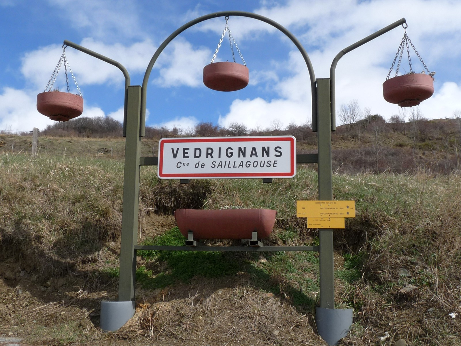 Panneau d'entrée, Védrinyans, Saillagouse, Pyrénées-Orientales, France